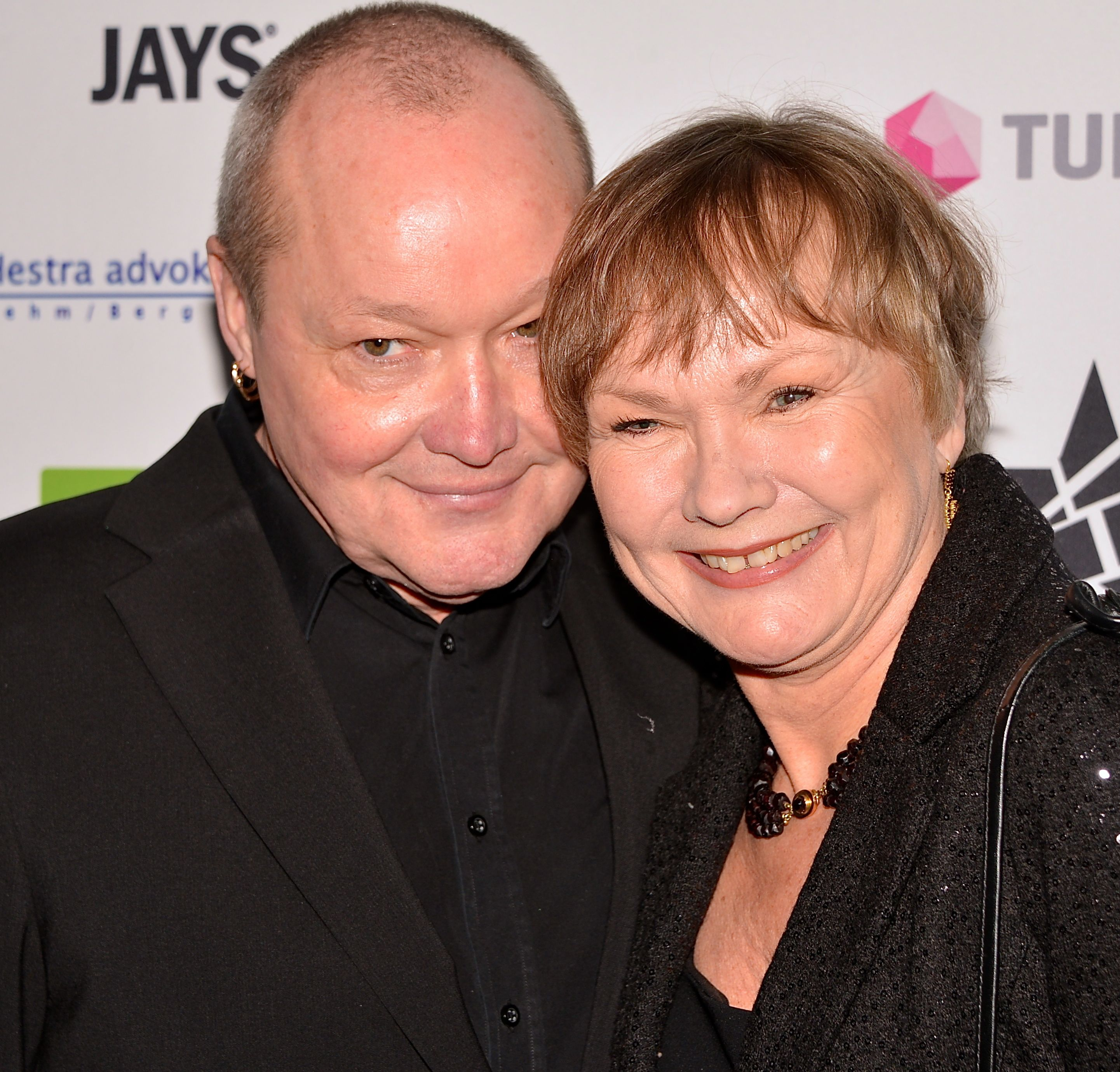 Nils Landgren & Beatrice Järås på Grammisgalan på Cirkus, Stockholm den 20 februari 2013.